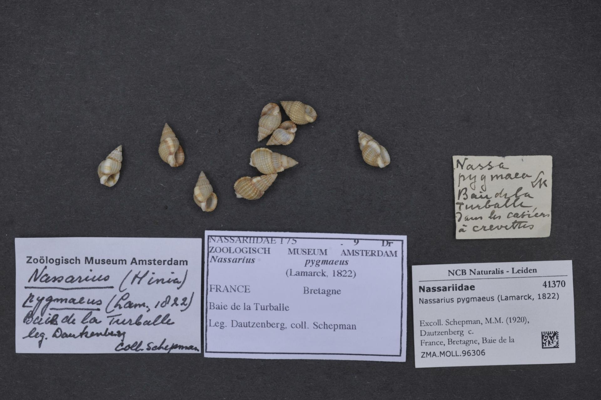 Tritia pygmaea (Lamarck, 1822) (synonym: Nassarius pygmaeus (Lamarck, 1822) )